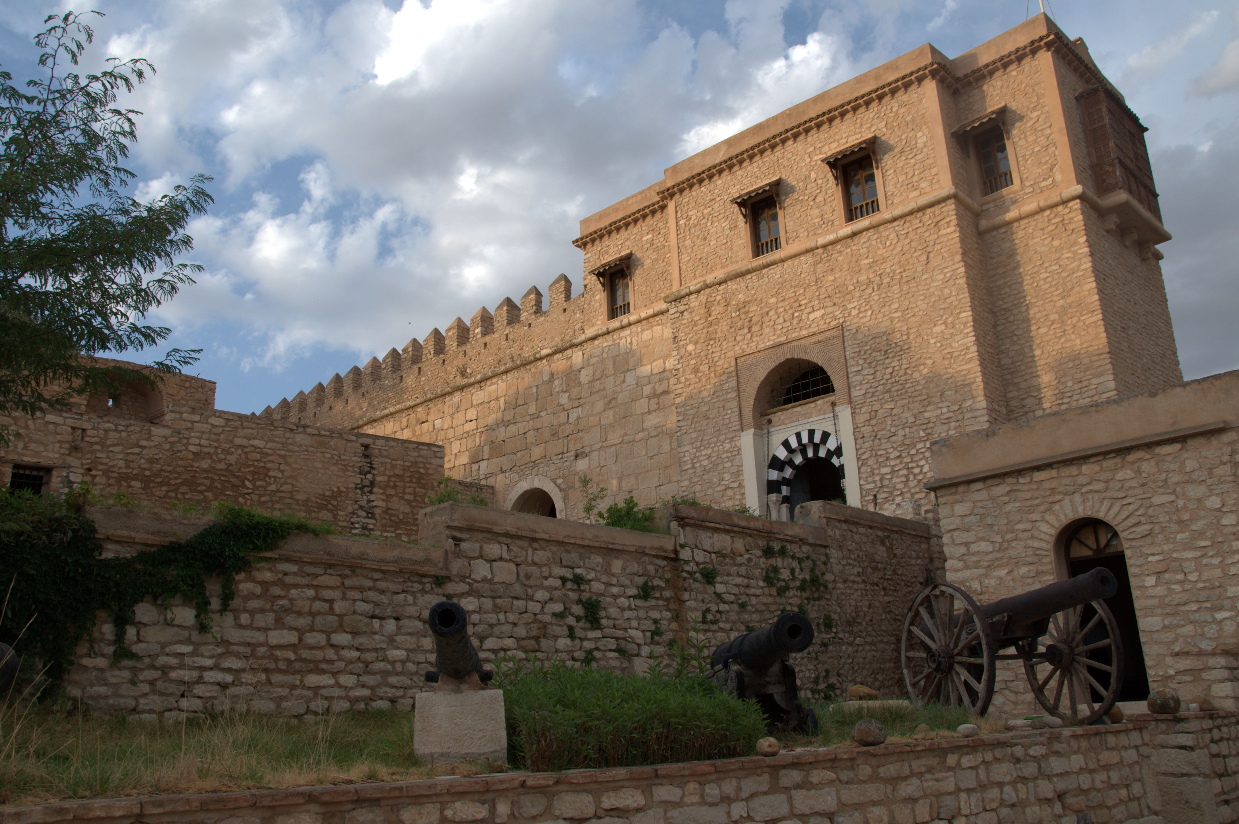 Kasbah du Kef (Tunisie)